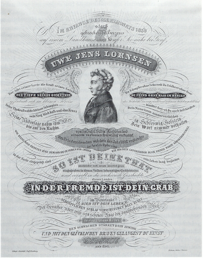 Uwe Jens Lornsen; Stich von 1838 aus dem Landesarchiv Schleswig.